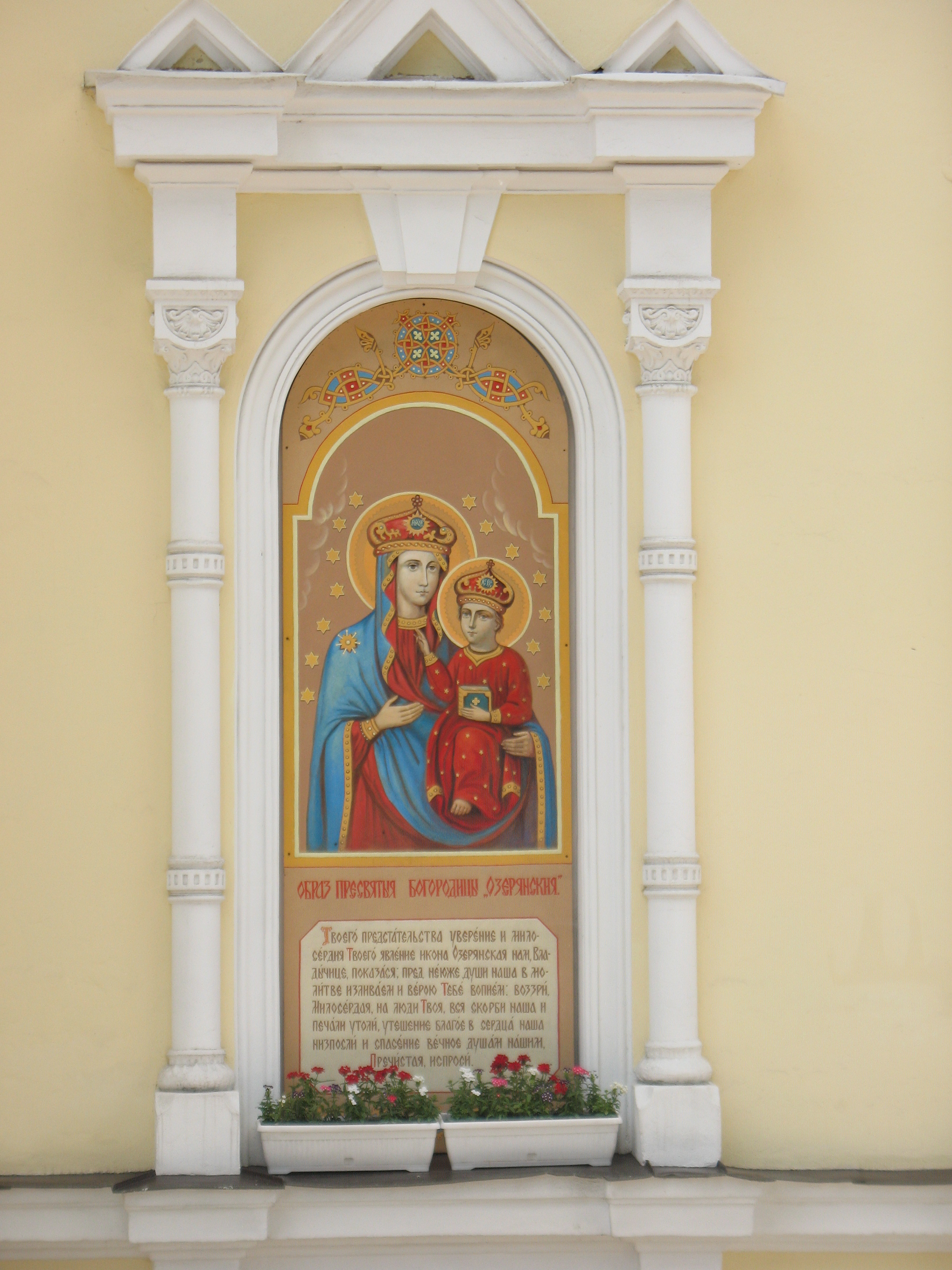 Большая копия Озерянской иконы (образ Пресвятыя Богородицы "Озерянския") на стене Свято-Озерянского храма в Покровском монастыре Харькова.